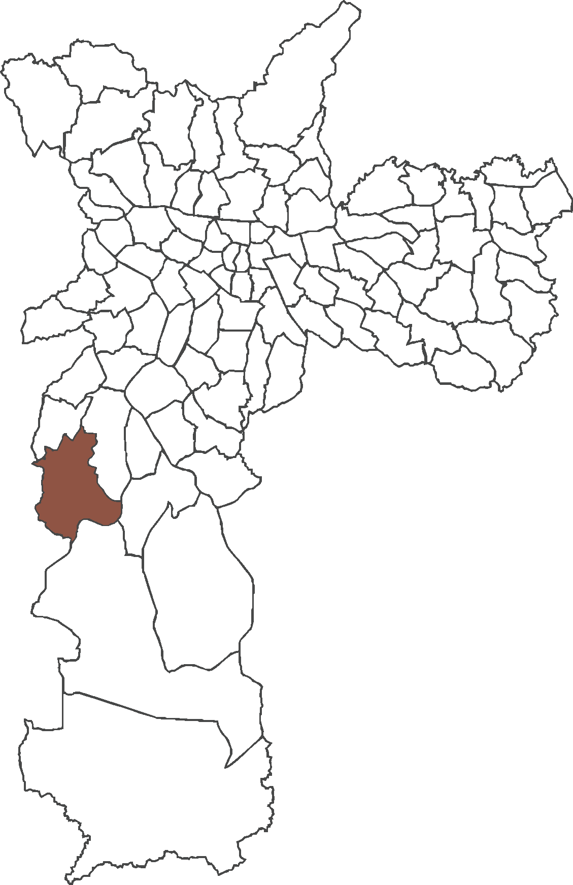 Localização do distrito do Jardim Ângela no município de São Paulo.